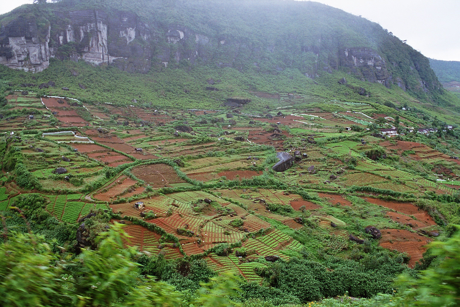 Tea garden in Sri Lanka